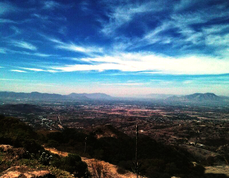 Actopan en el Valle del Mezquital